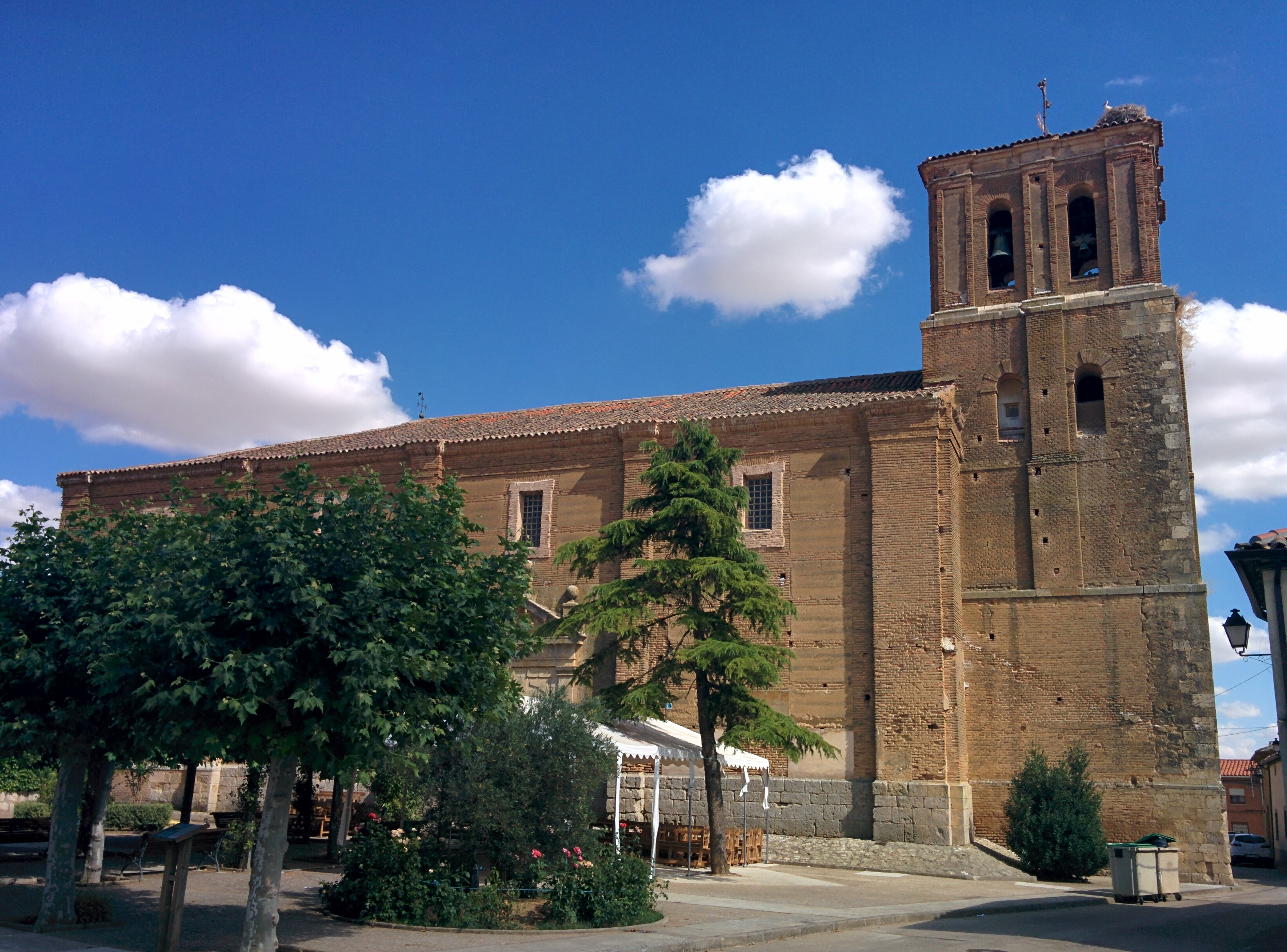 Iglesia del Salvador, en Herrín de Campos (Valladolid, España).